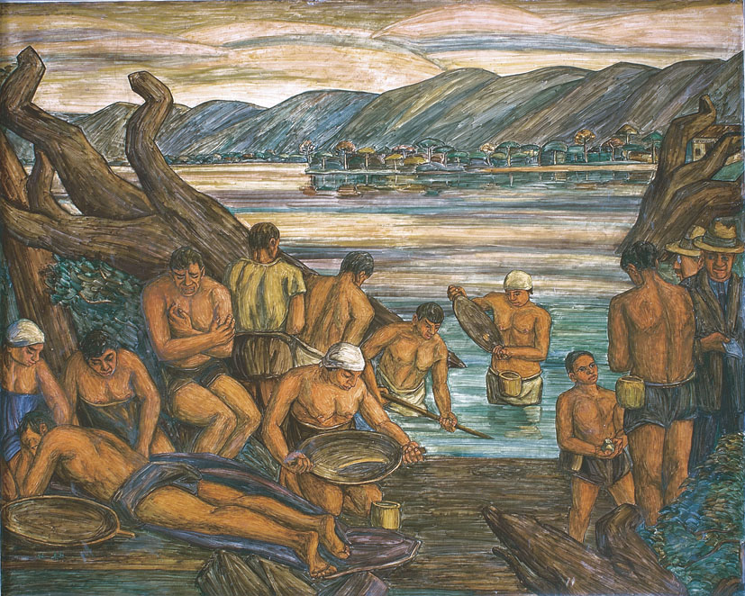 mural al fresco en el antiguo palacio municipal, hoy en día sede del Museo de Antioquia.